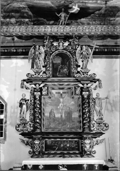 Altaruppsats från 1683, skulpterad av Marcus Jäger d ä, målad av Johan Hammer. Kategori: (05) AltarprydnaderAltaruppsats från 1683, skulpterad av Marcus Jäger d ä, målad av Johan Hammer.